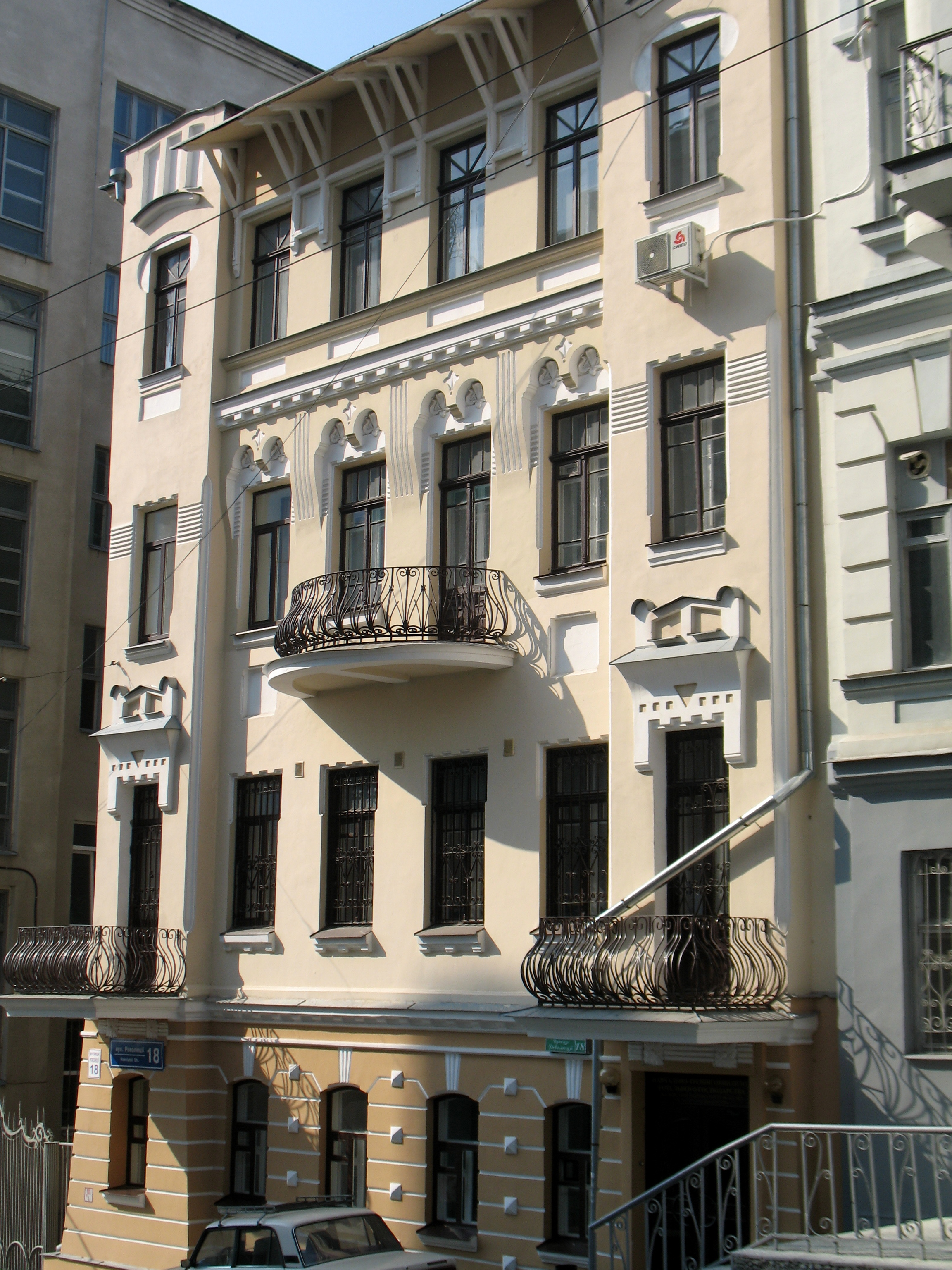 Харківська національна академія міського господарства